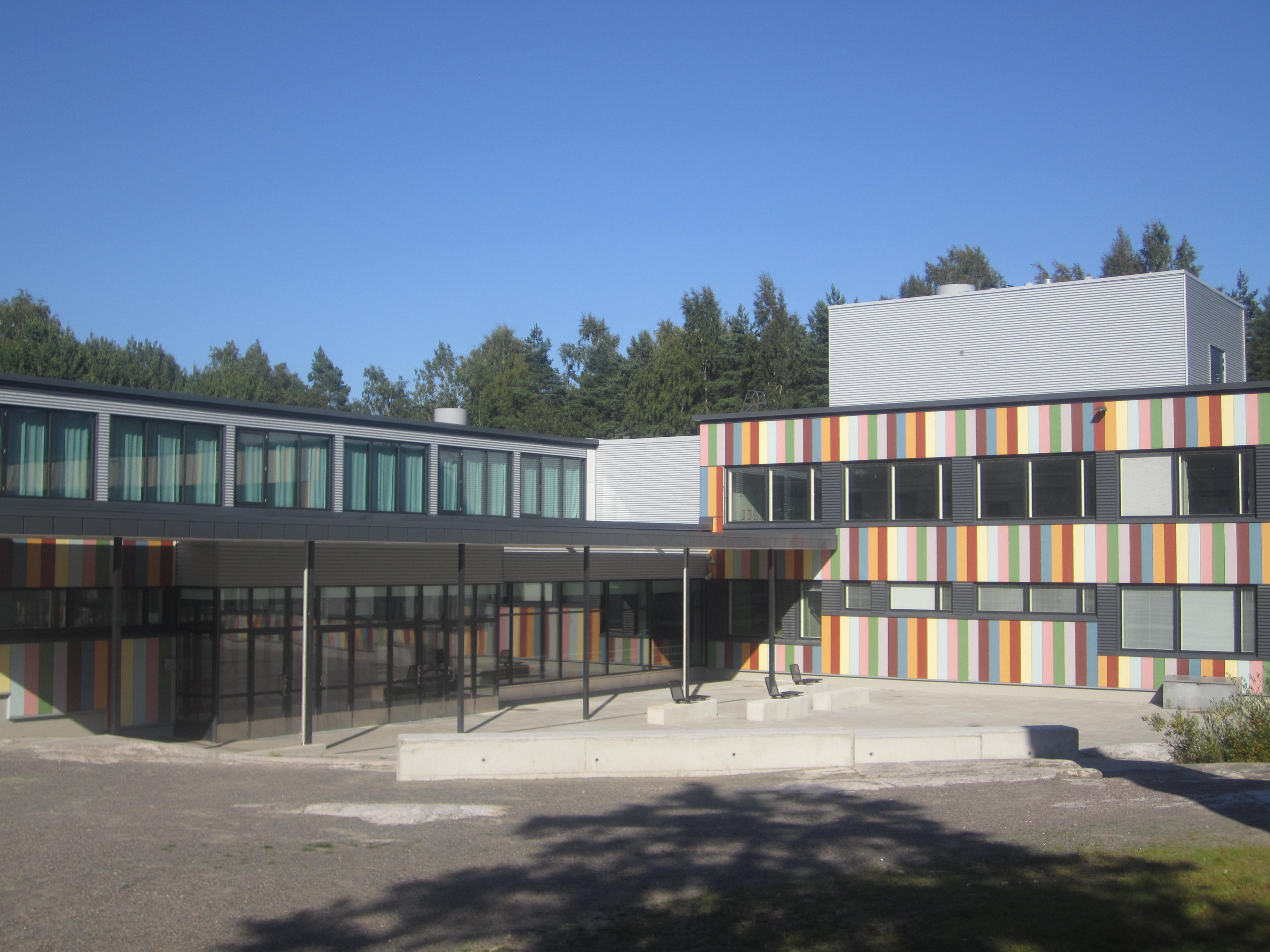 Vesalan yläaste Helsingin Kontulassa.